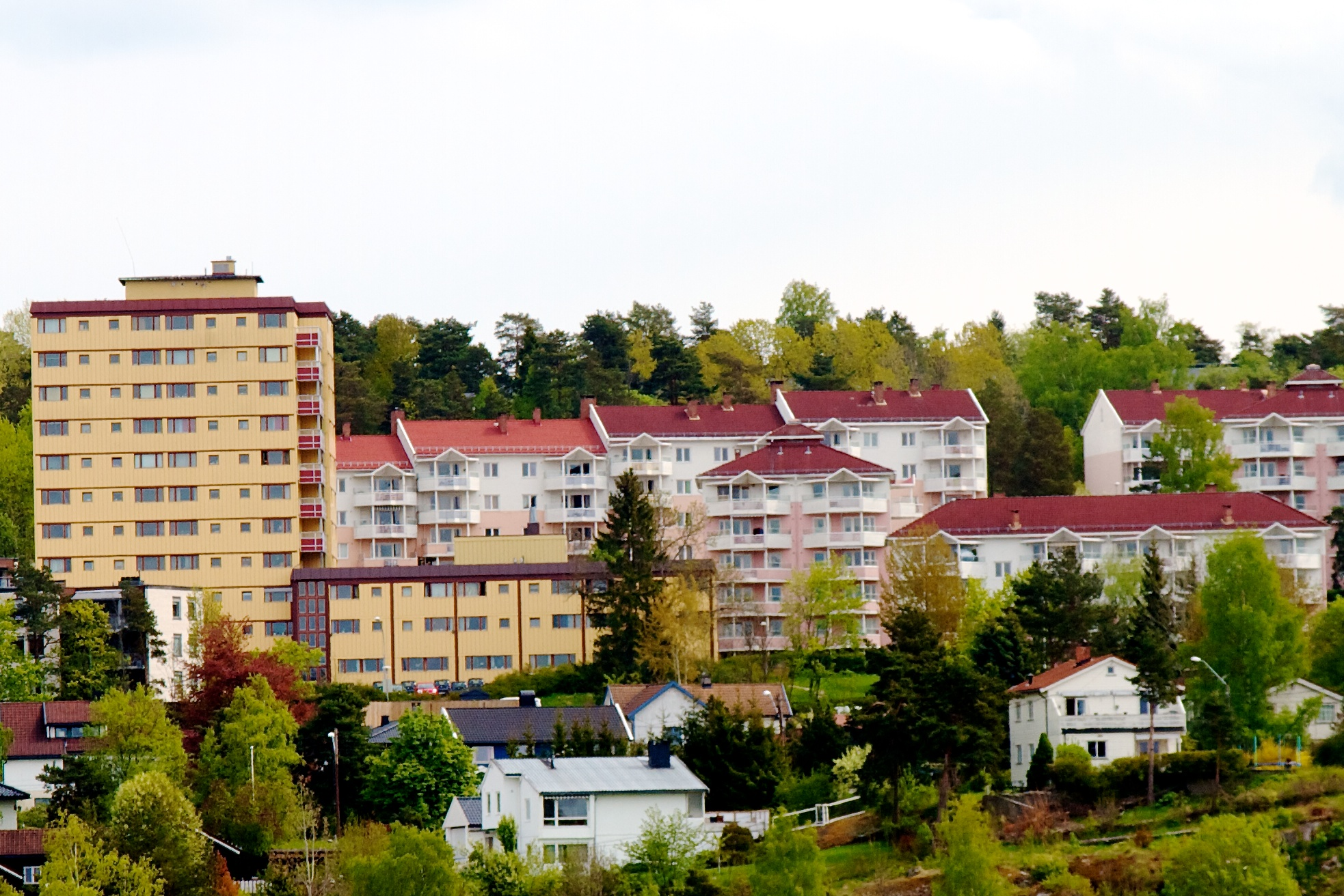 Oppsal sett fra Rognerud. Bydel Østensjø i Oslo.